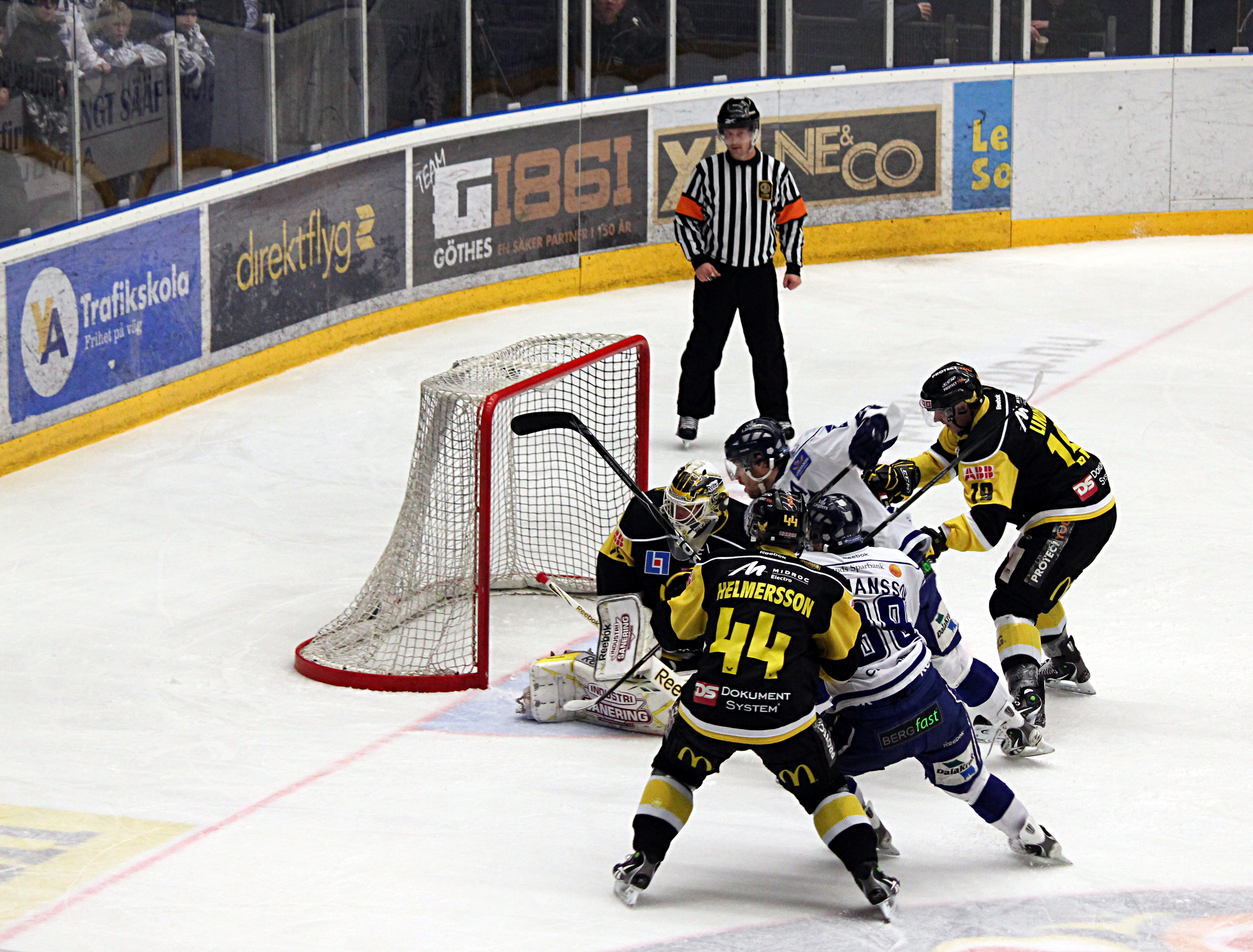 Jesper Ollas och Daniel Hermansson i Leksands IF mot Johan Gustafsson (målvakt), Per Helmersson och Andreas Lindh i VIK Västerås HK 29 januari 2011.